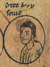 Otto II of Swabia